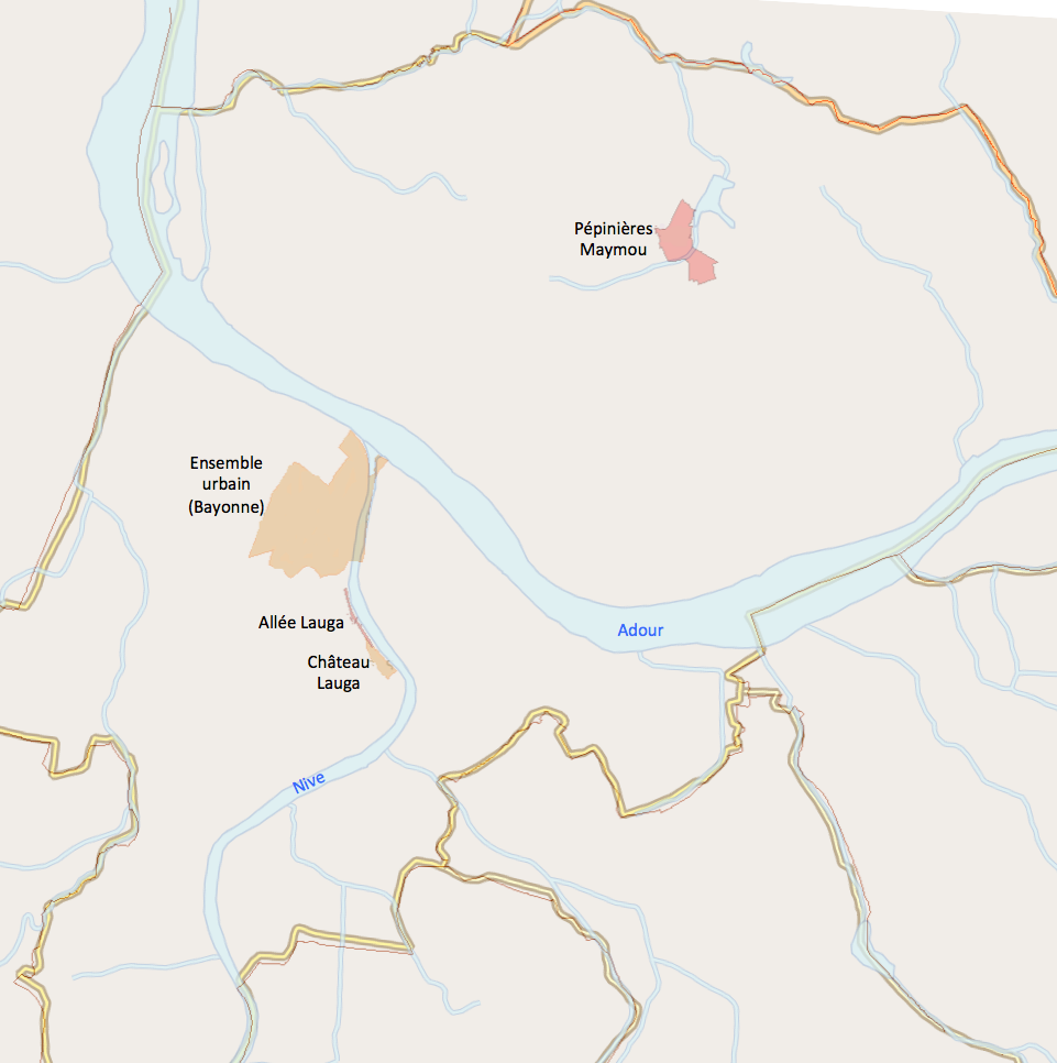 Bayonne - Sites inscrits ou classés